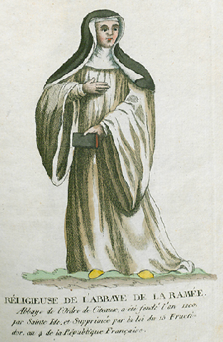 Collection de costumes de tous les ordres monastiques, supprimés à differentes époques, dans la ci-devant Belgique, Bruxelles, Philippe Joseph Maillart et sœur, 1811